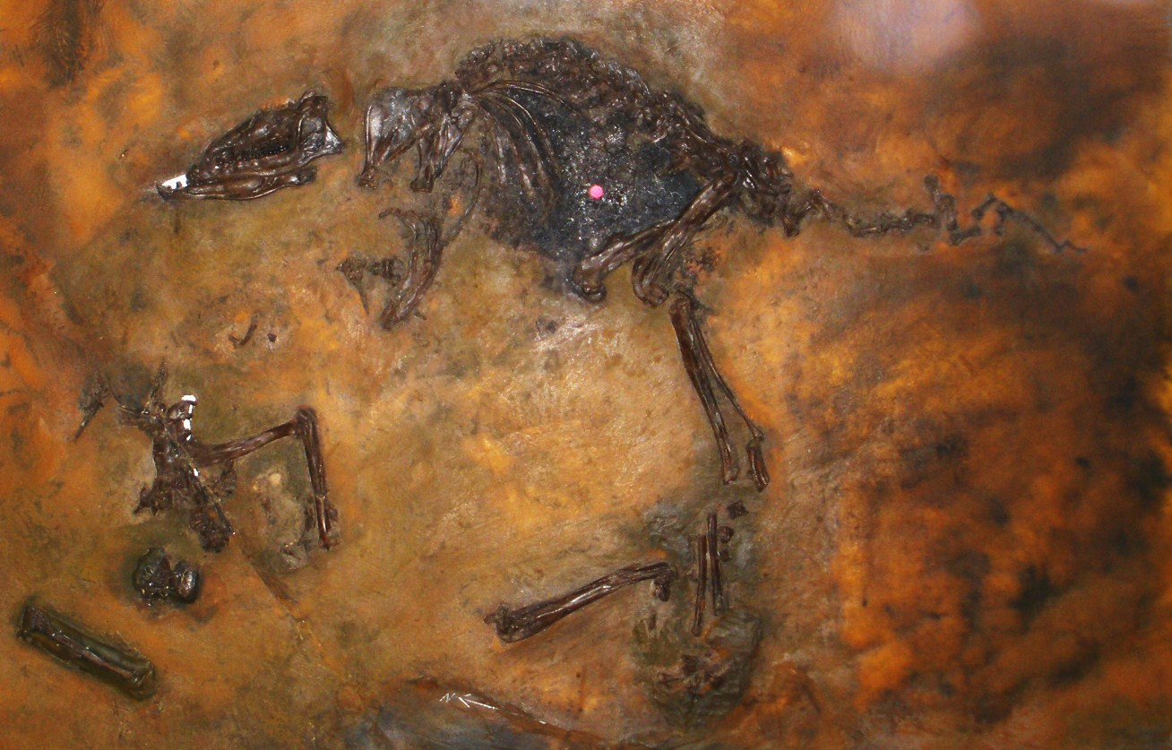 Fossil of Messelobunodon, an extinct mammal- Took the photo at Senckenberg Museum of Frankfurt